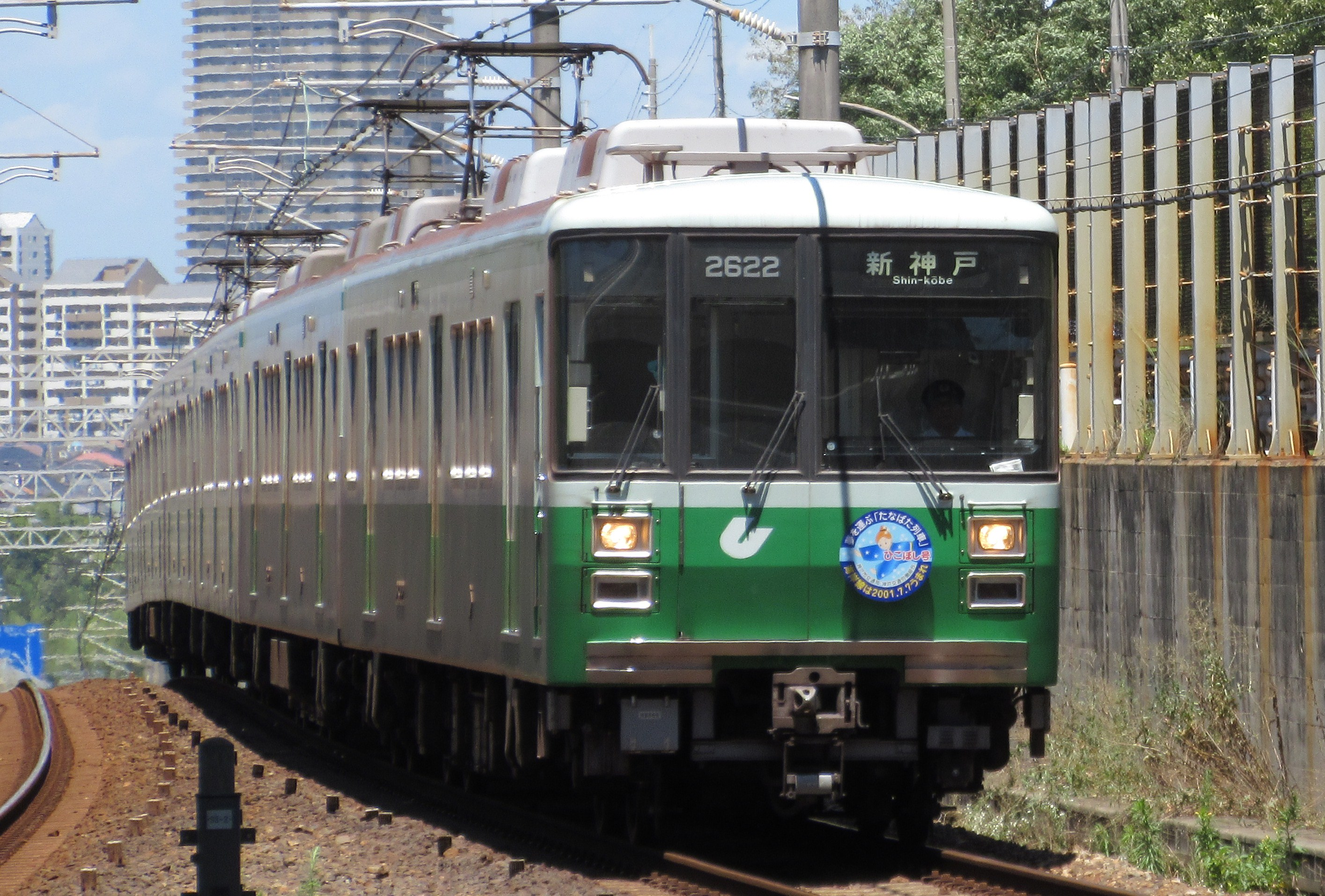 神戸市営地下鉄2622編成(西神南駅にて)